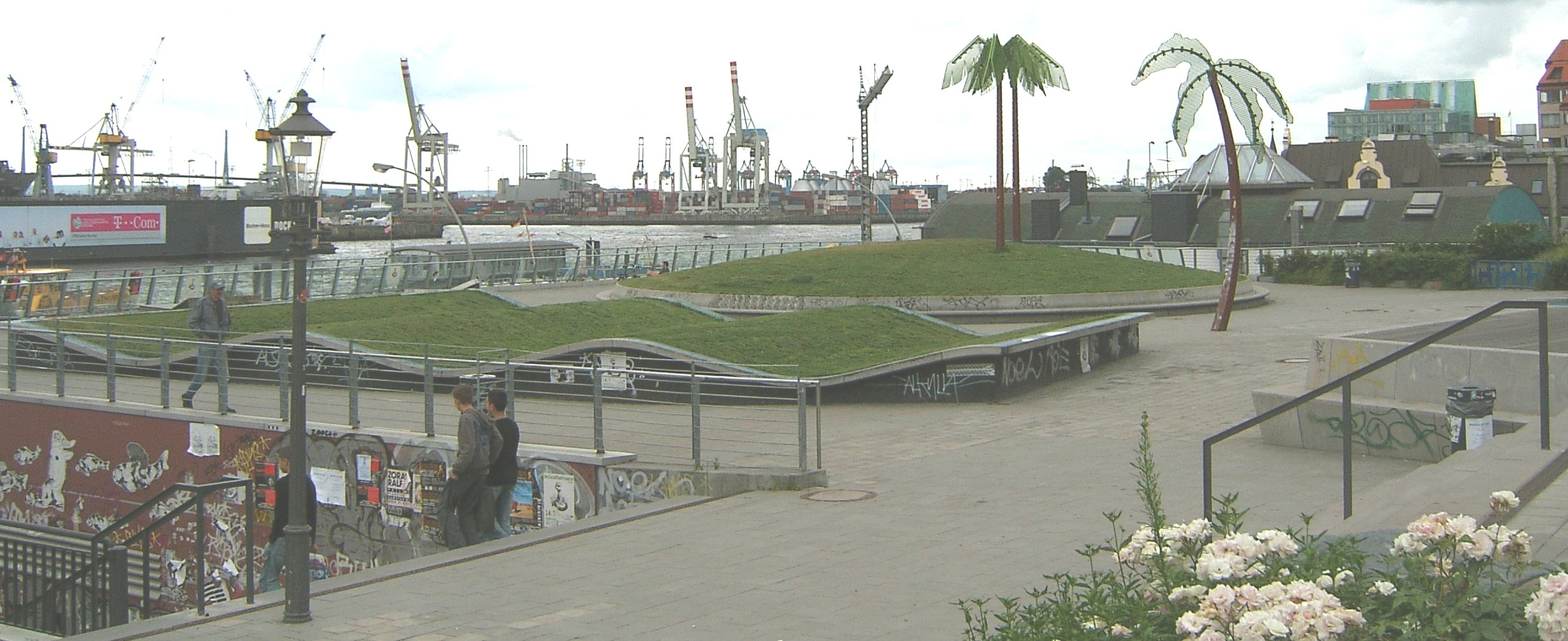 Der Antonipark auf St. Pauli mit dem Kunstprojekt Park Fiction.